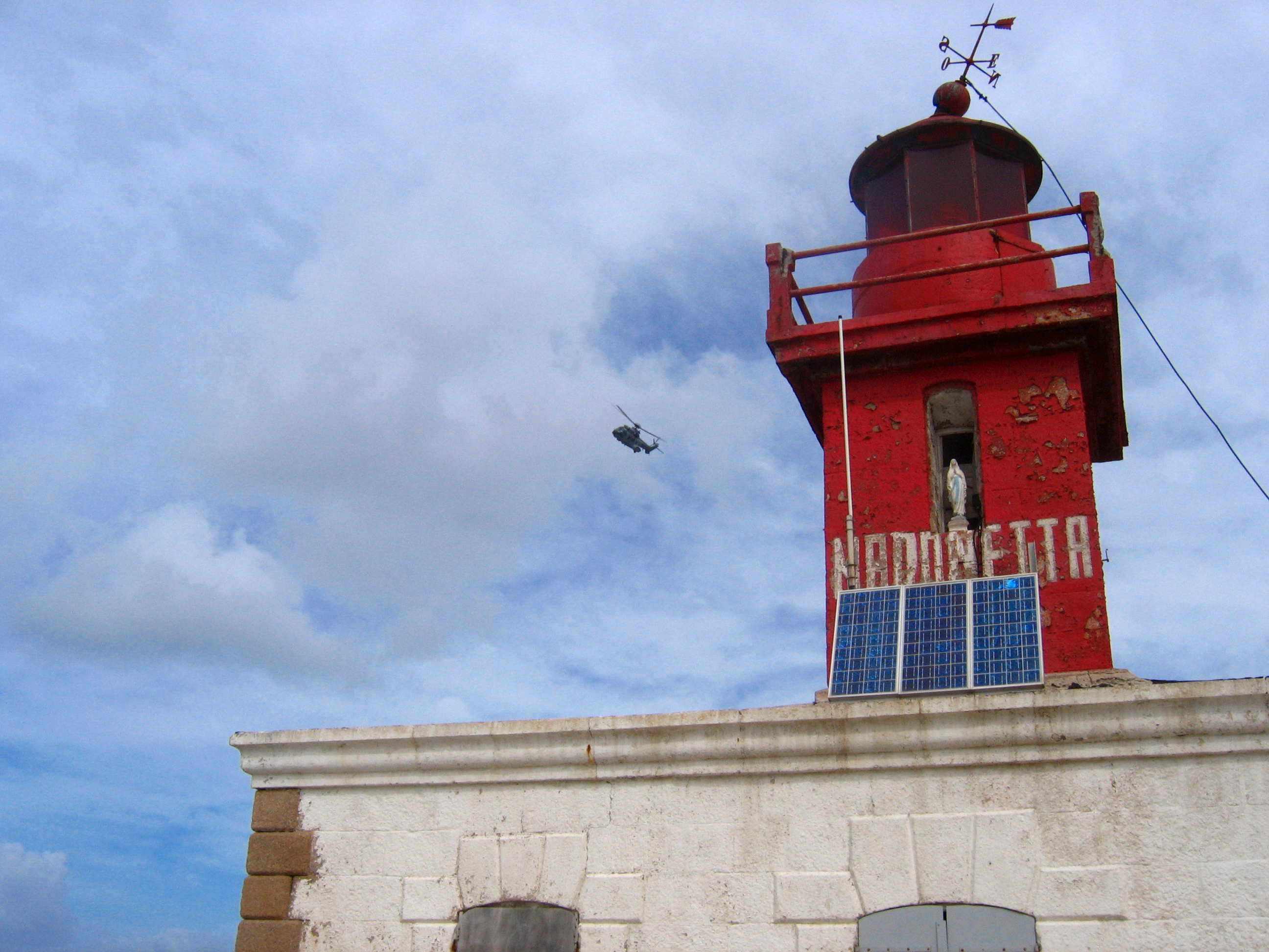 Phare de la Madonetta